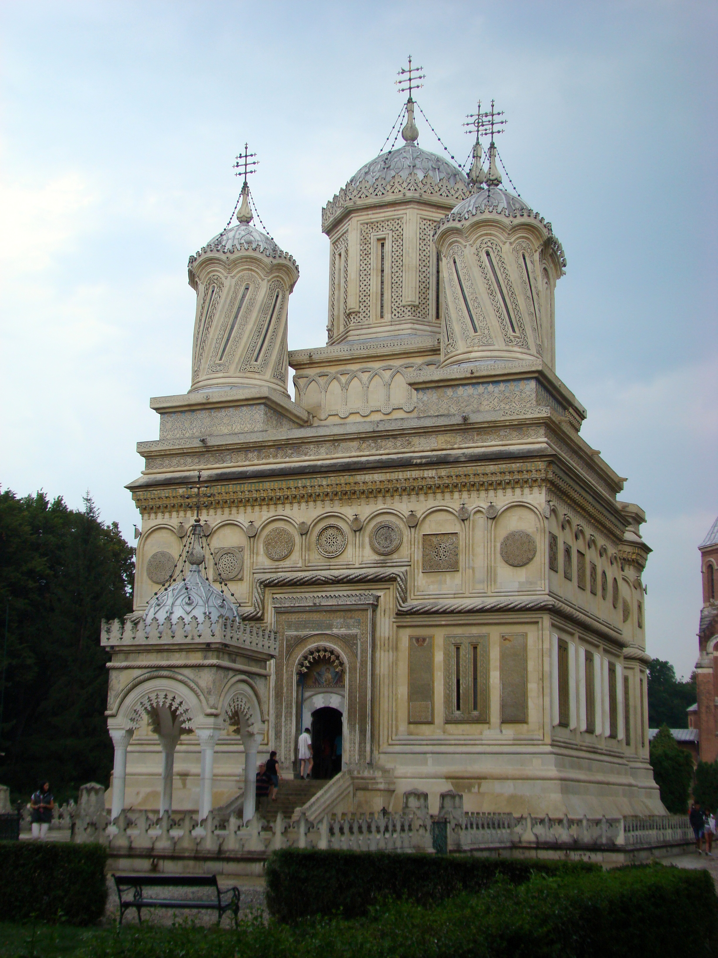 Biserica Episcopală "Adormirea Maicii Domnului" 01